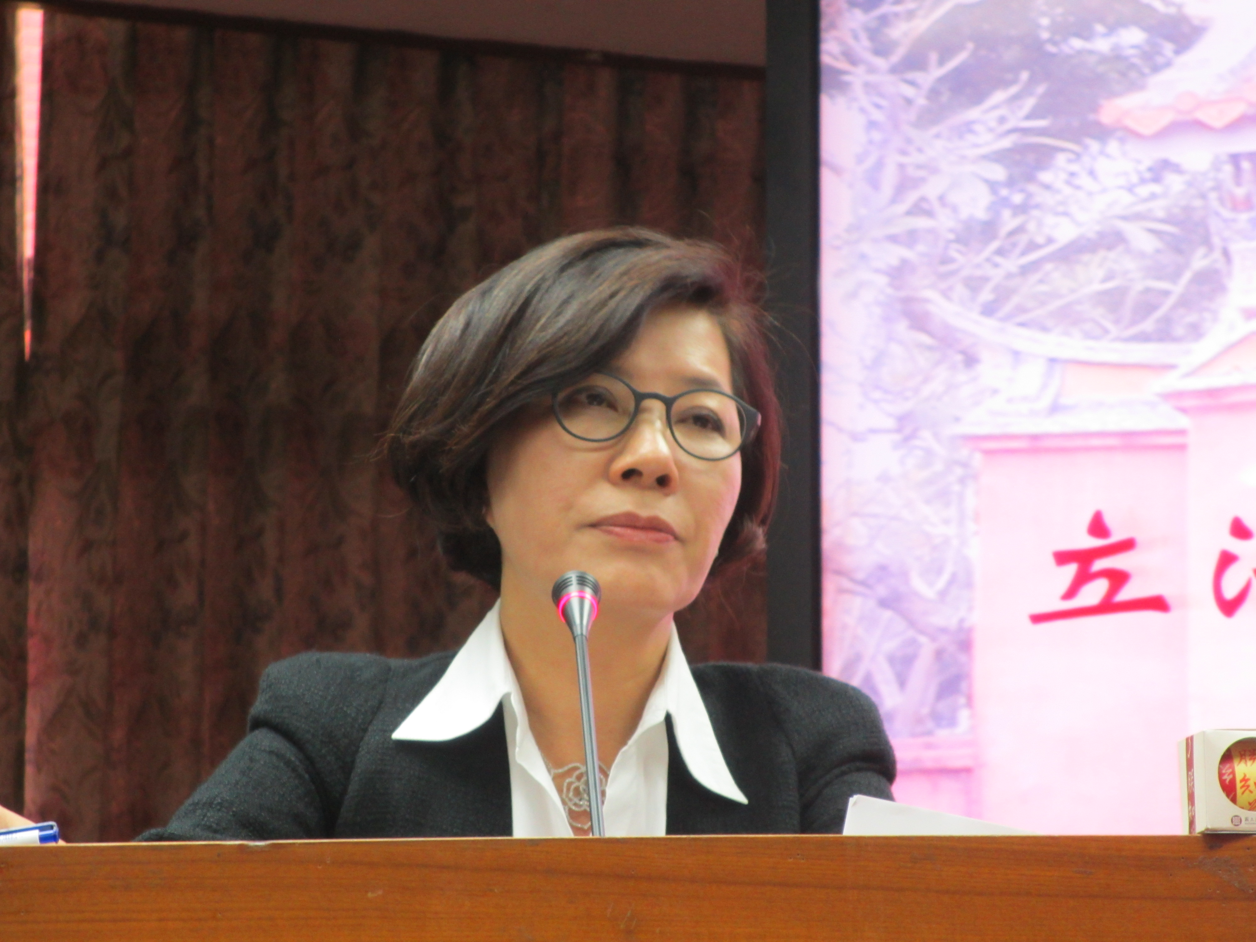 中文（台灣）: 執政黨國民黨立委陳淑慧（美國之音張永泰拍攝）